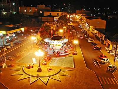 Foto noturna da Praça da Amizade em Dois Vizinhos.